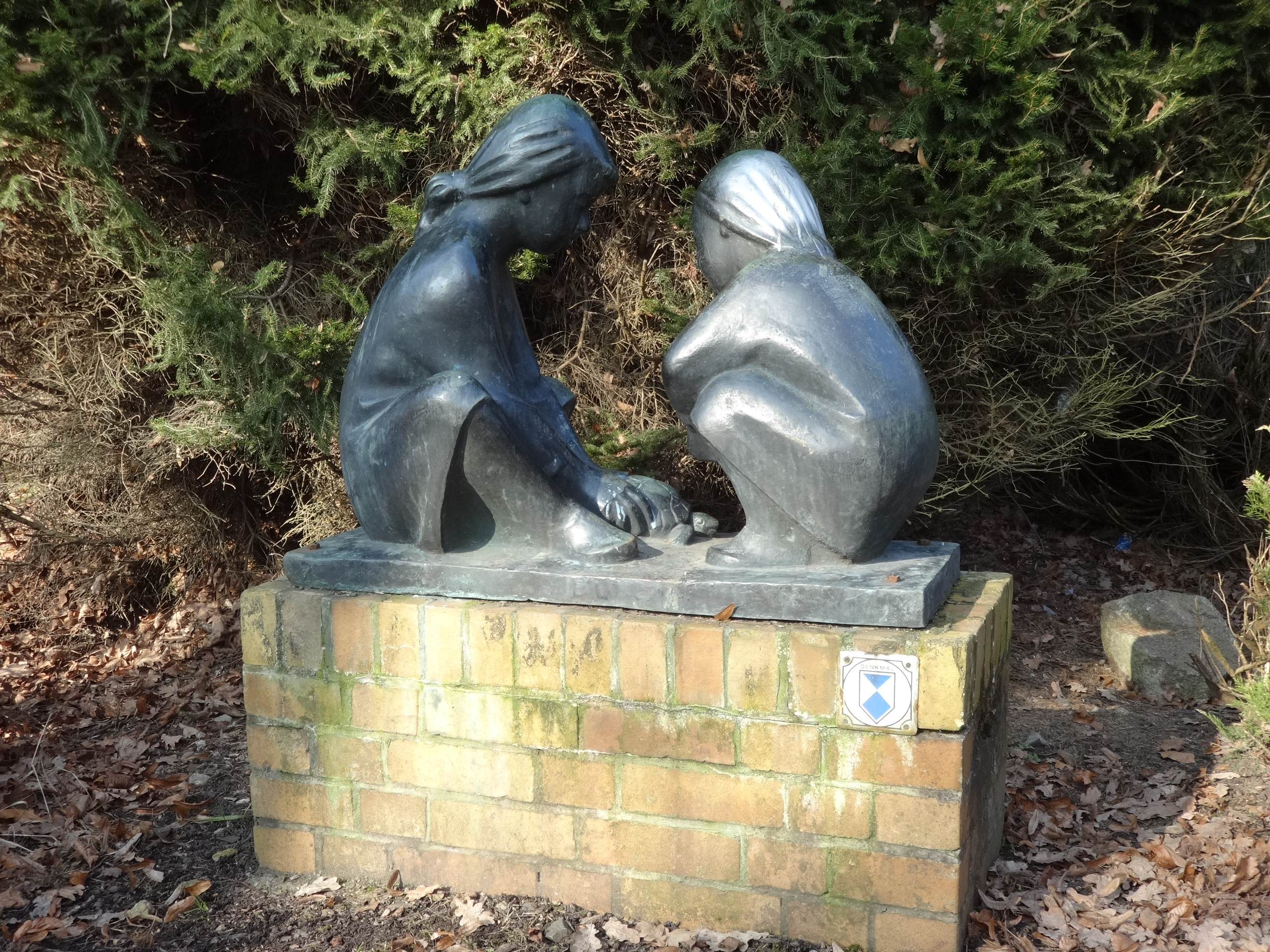 Der Schlosspark befindet sich im nordwestlichen Teil außerhalb der Altstadt von Jüterbog. Sein Name geht auf eine mittelalterliche Burg zurück, die heute nicht mehr vorhanden ist.